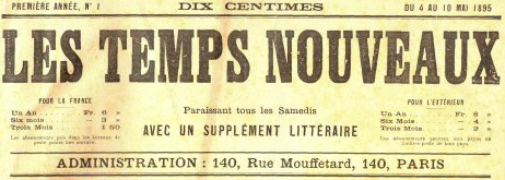 Journal Les Temps Nouveaux (1895-1914)